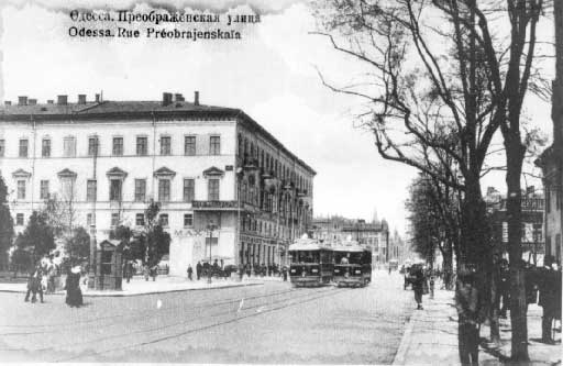 Дом Попудова в Одессе